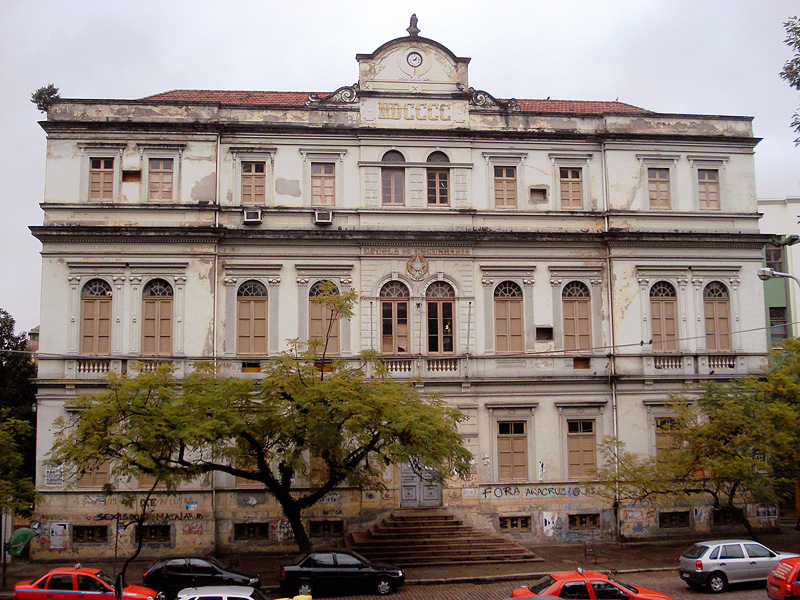 Escola de Engenharia, um prédio histórico da Universidade Federal do Rio Grande do Sul, Porto Alegre, Brasil.